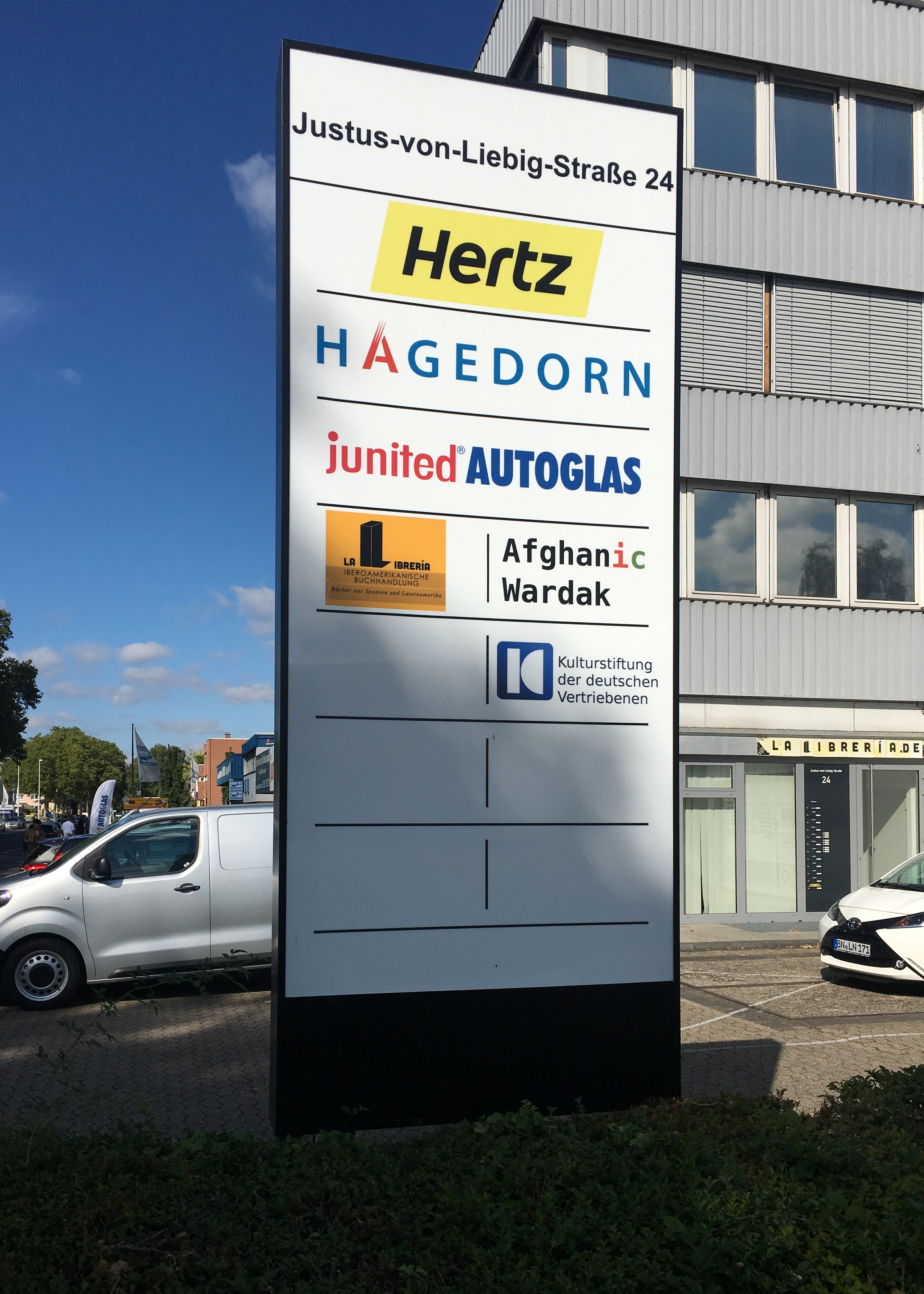 Deutschland, NRW, Bonn-Dransdorf: Sitz der Geschäftsstelle der Kulturstiftung der deutschen Vertriebenen.